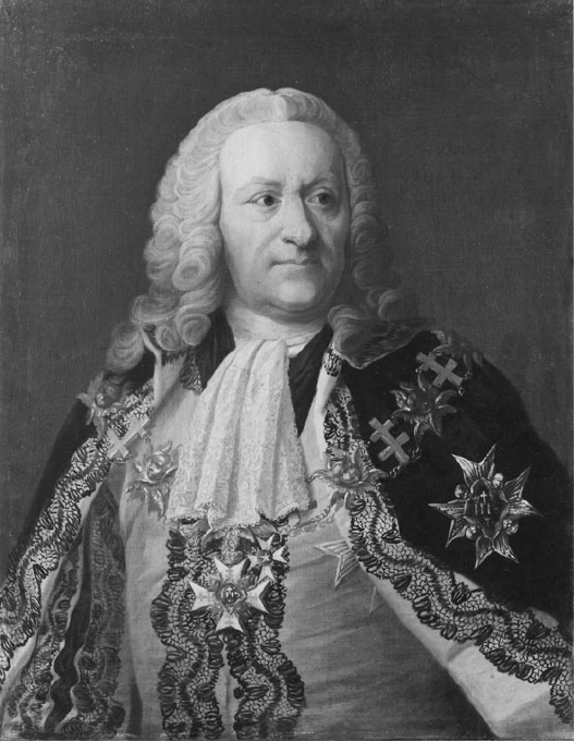 Gabriel von Seth, Född 1690, Död 1774.